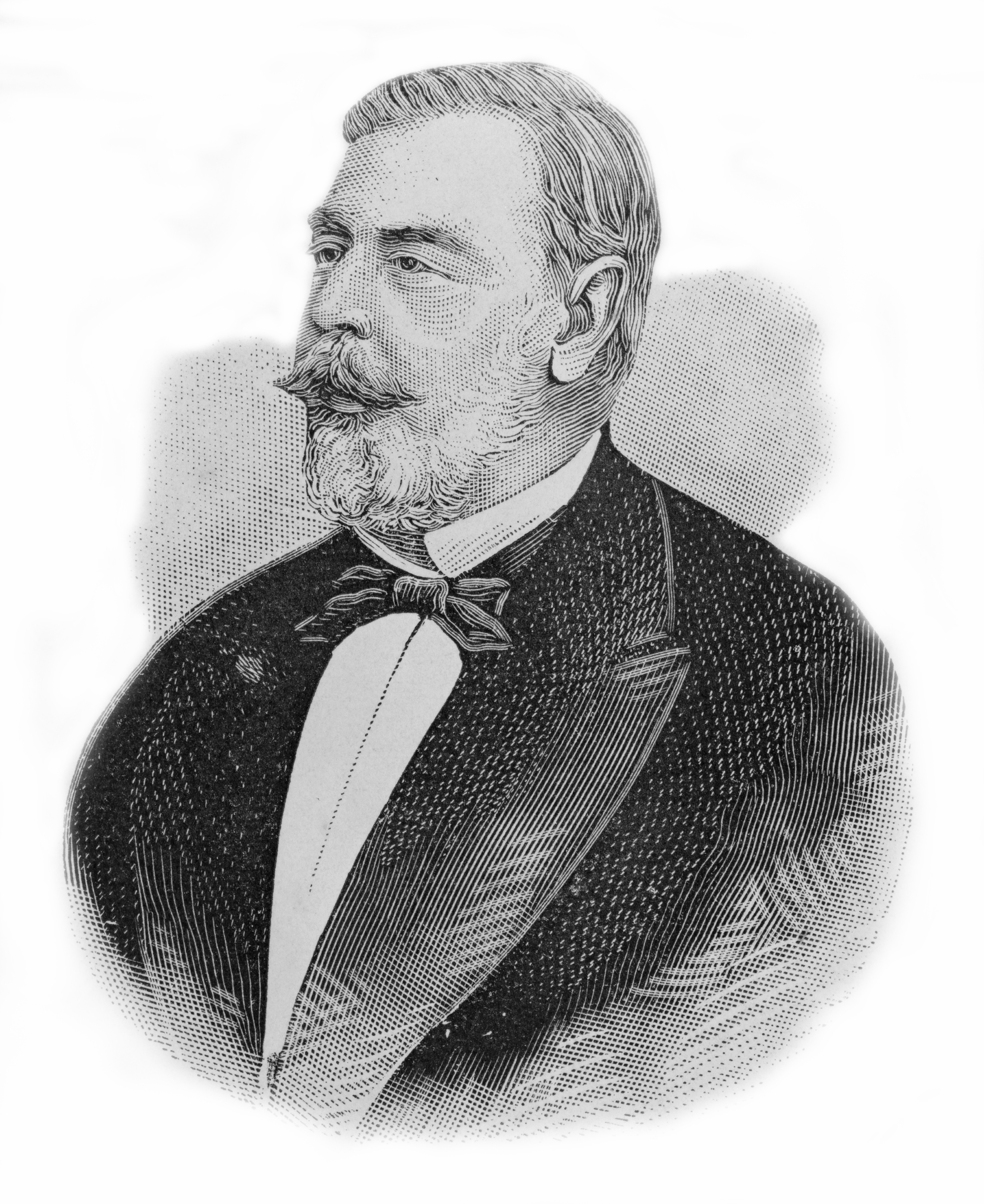 Manuel Luís Osório, o Marquês do Herval, (1808—1879), militar e político brasileiro, herói da Guerra da Tríplice Aliança.